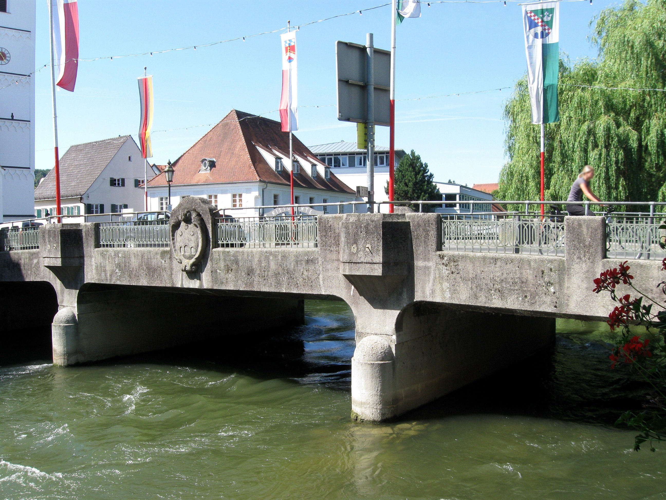 Amperbrücke in Fürstenfeldbruck